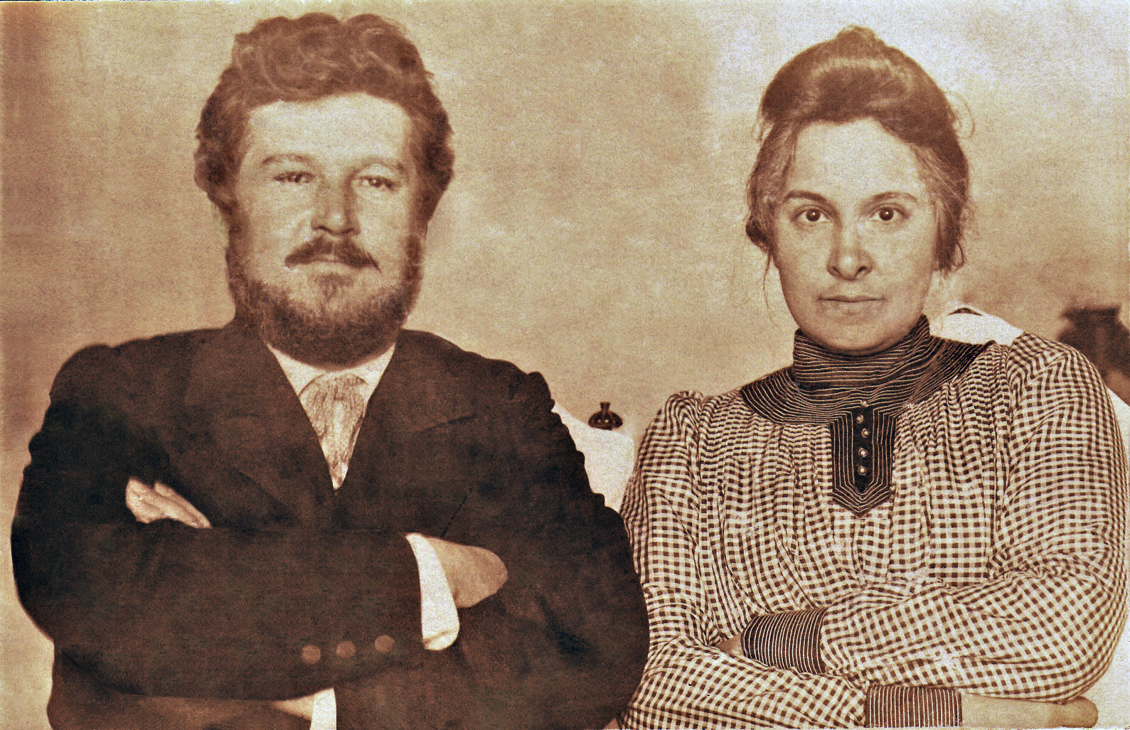 Константин Константинович Соколов и Зинаида Сергеевна Соколова